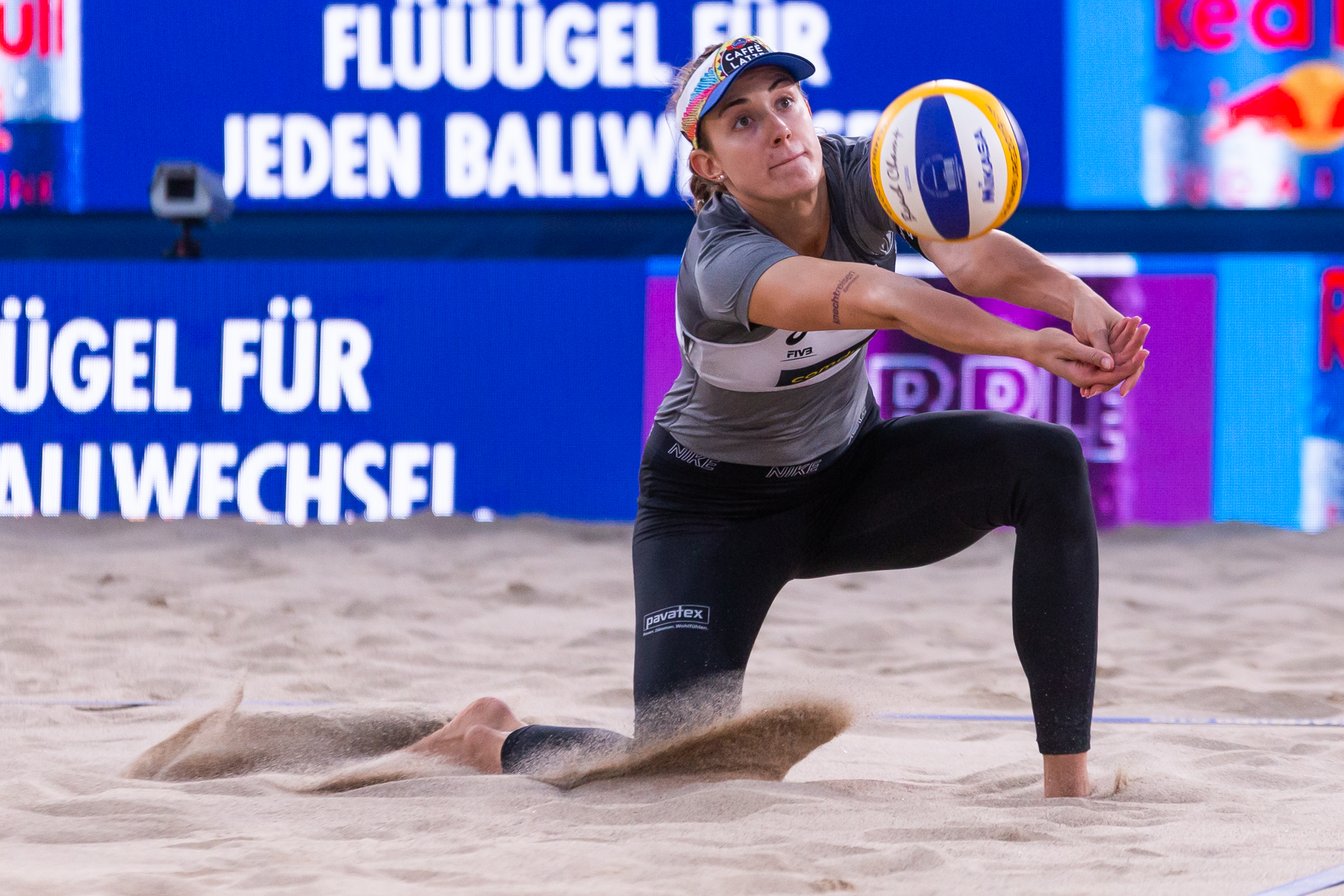 BeachVolleyball Weltmeisterschaft Hamburg 2019; Tanja Hüberli (SUI, Schweiz)